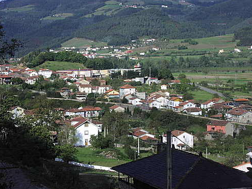 Vista del pueblo de Peñaullán (Pravia)